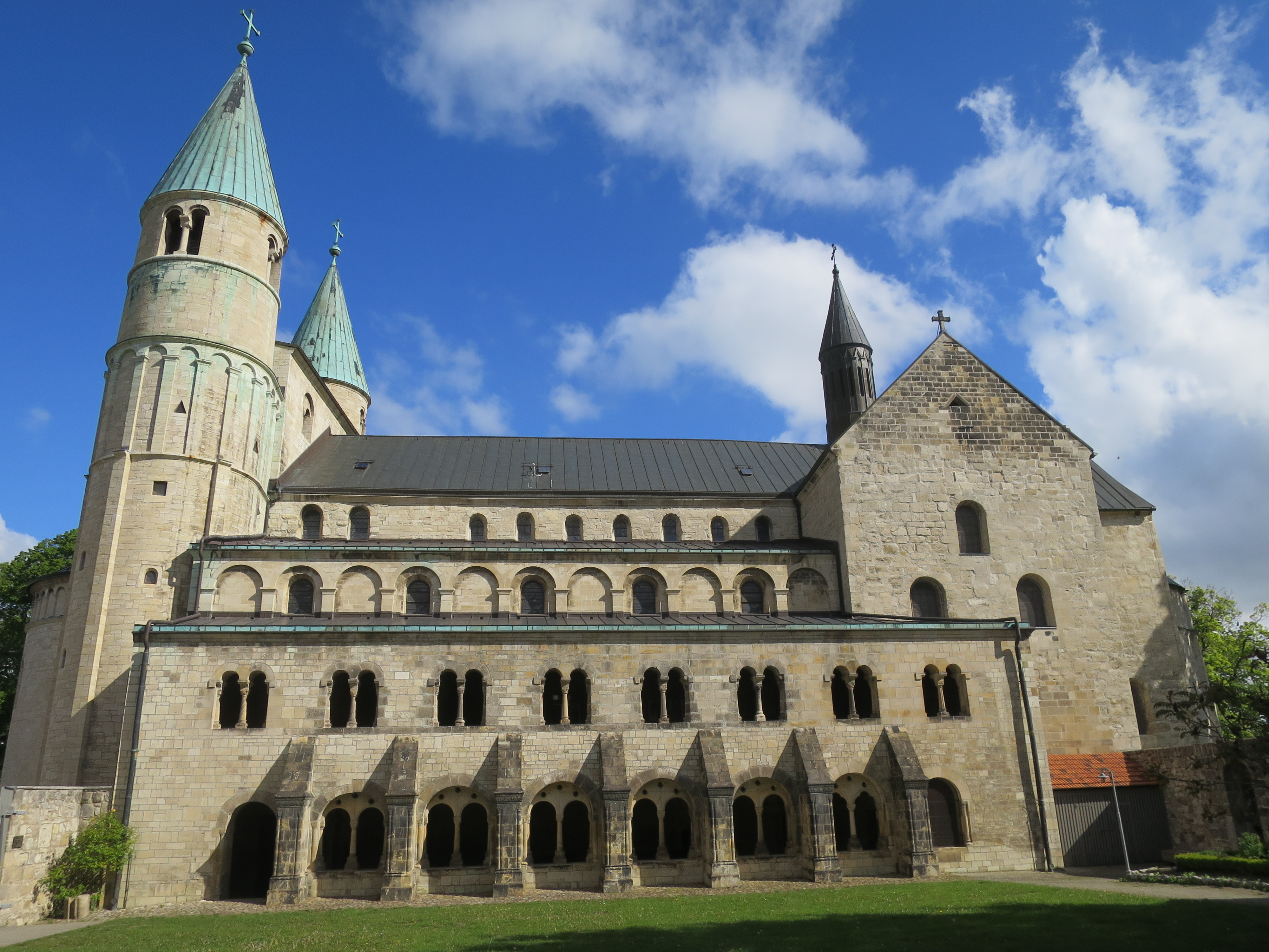 Stift Gernrode Südansicht